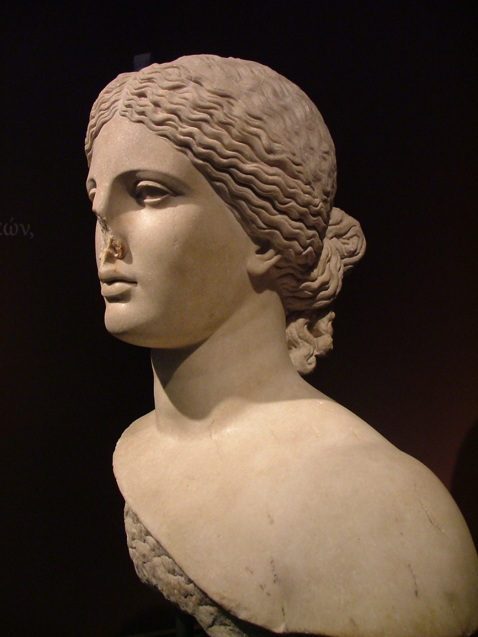 Cabeza de mármol de Venus se encuentra en las ruinas del antiguo teatro de Arles. Según algunos investigadores es una réplica de una obra original de Praxíteles Afrodita o Friné asociado. Museo de Arles antiguo